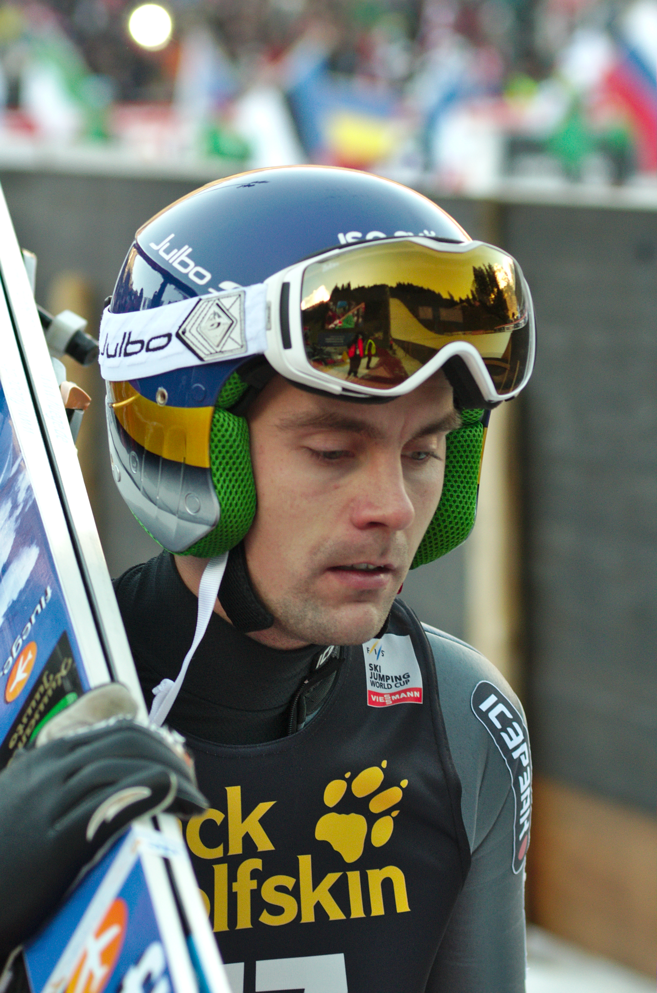 FIS Ski Jumping World Cup 2014 - Engelberg - 20141220 - Anssi Koivuranta